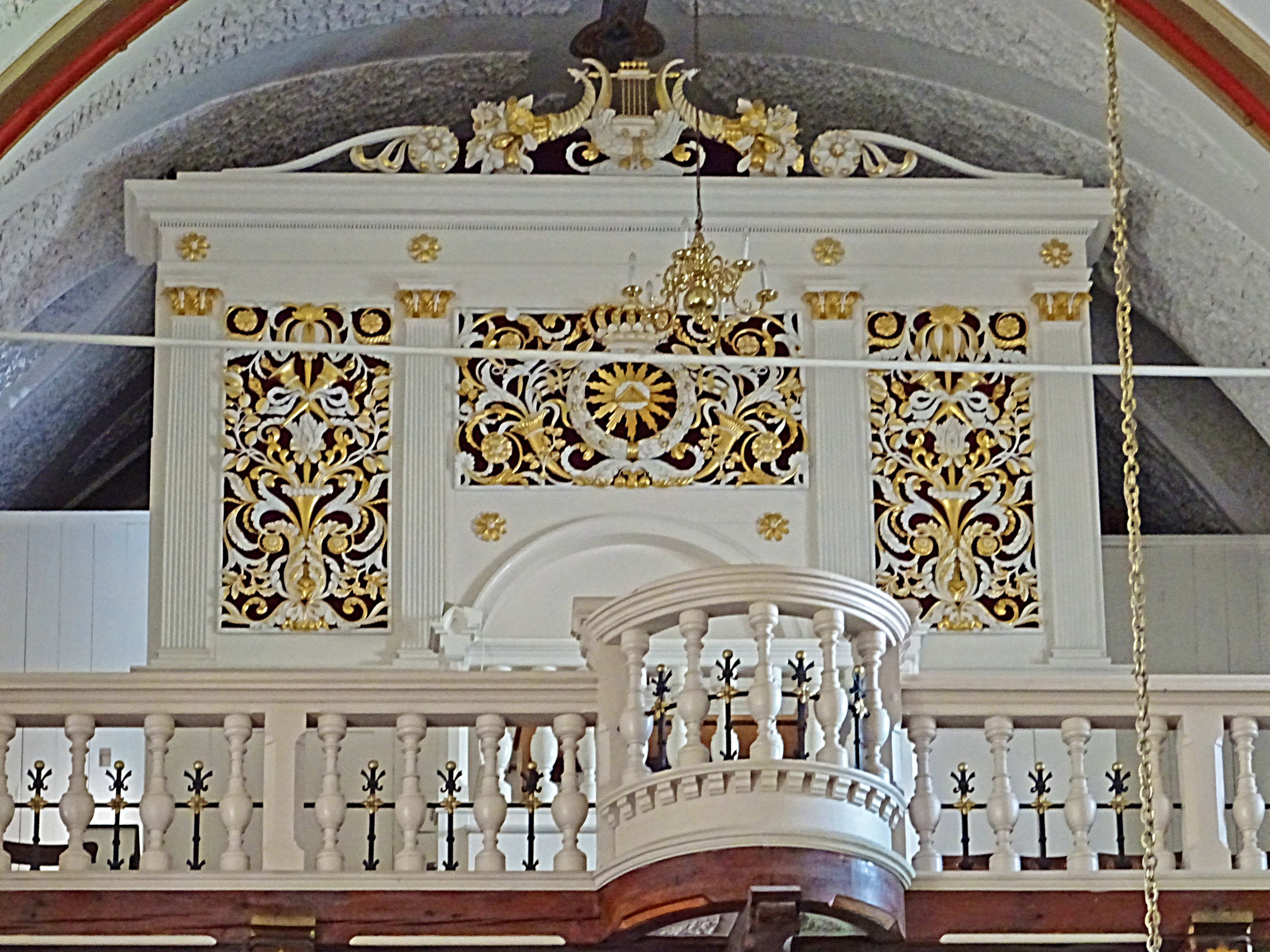 Biedermeier-Prospekt der Orgelbaufirma Schulze von 1833 in St. Petri (Mühlhausen, Thüringen)